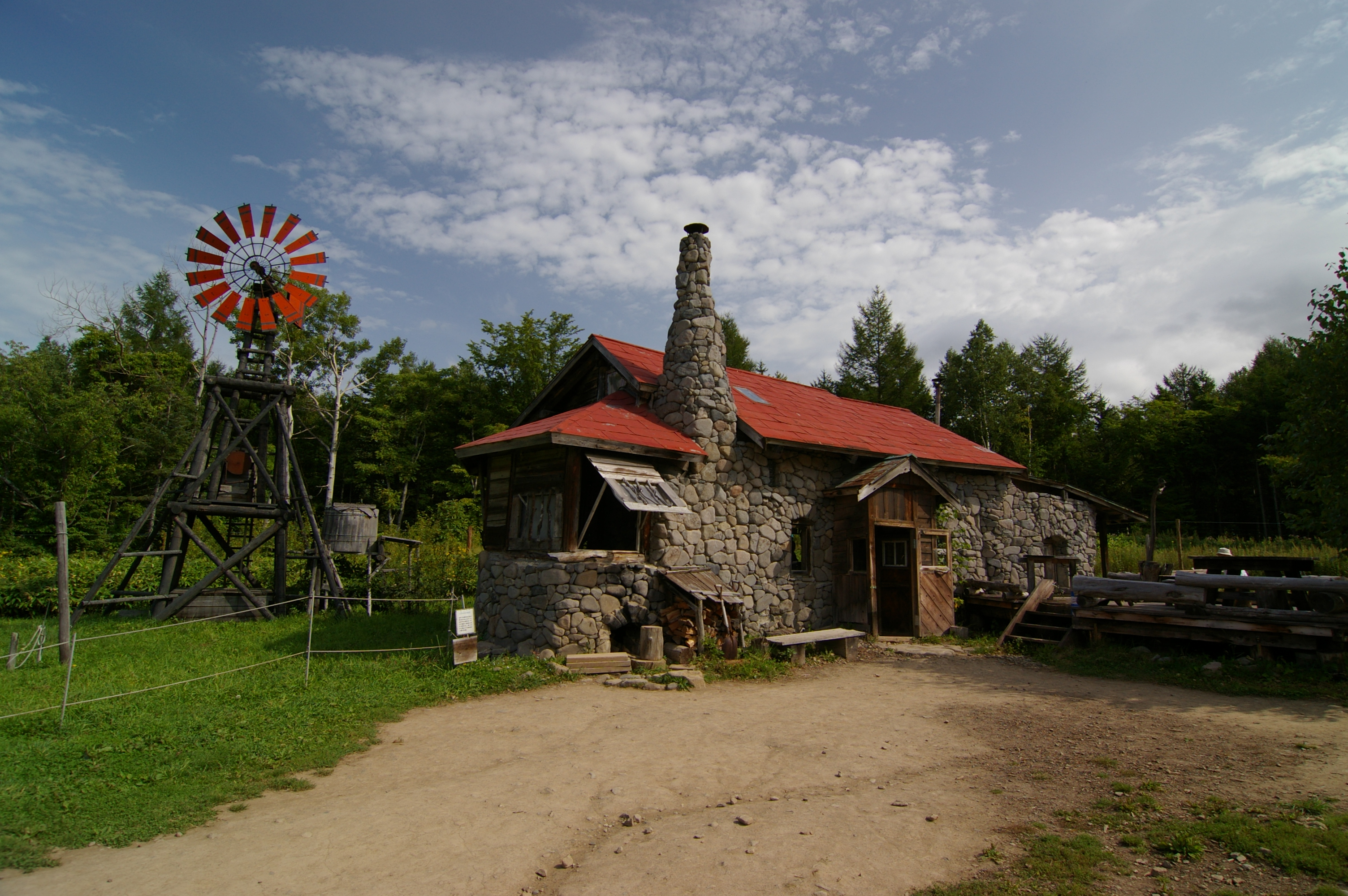 北の国から「五郎の石の家」(北海道富良野市)